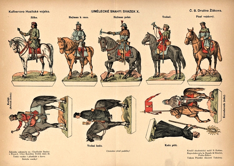 Husitské vojsko vytvořené Baltazarem Kutinou (1853–1923) na základě podkladů Hanuše Kuffnera